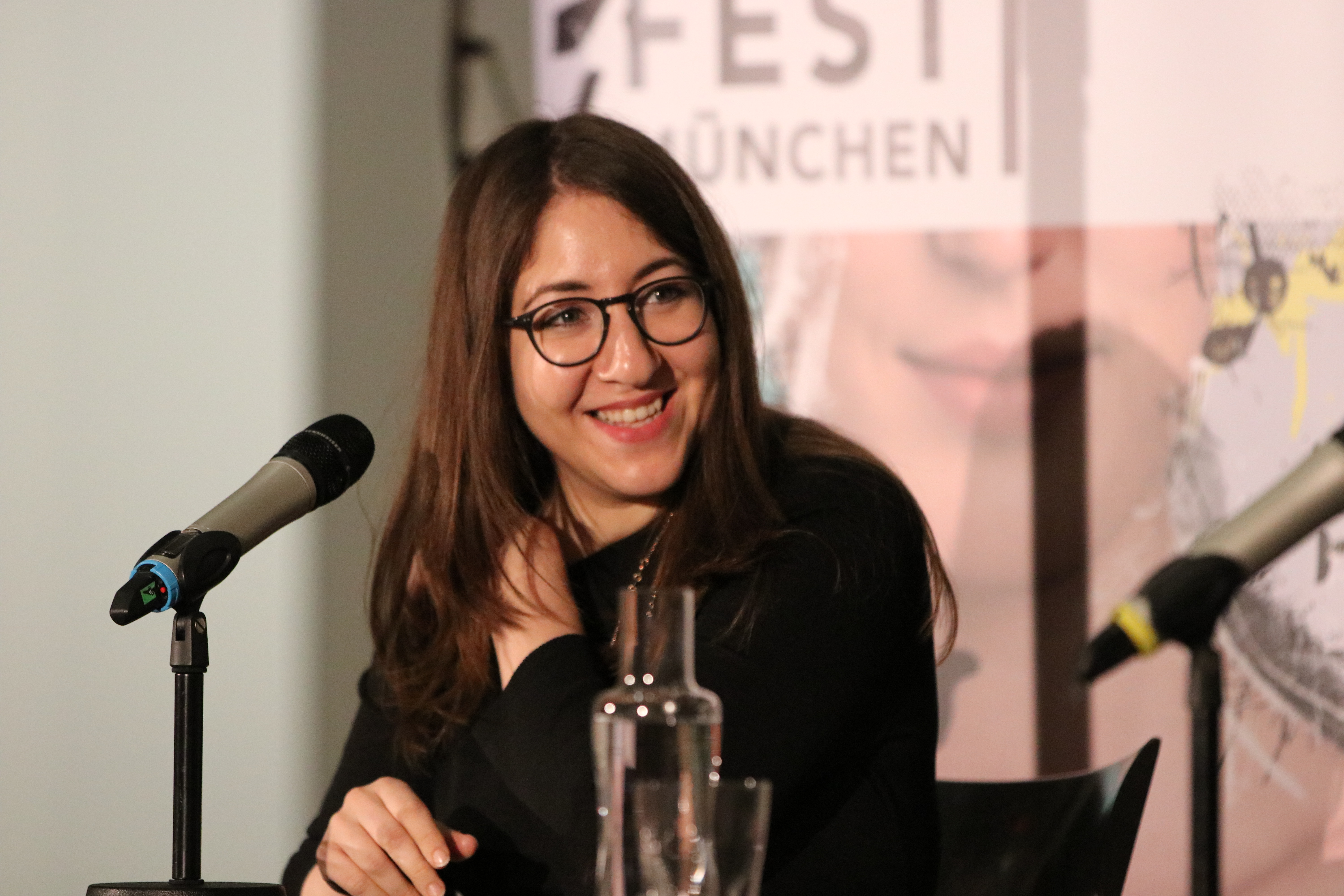 Die US-amerikanisch-deutsche Schriftstellerin Deborah Feldman auf dem forum:autoren des Literaturfests München 2017